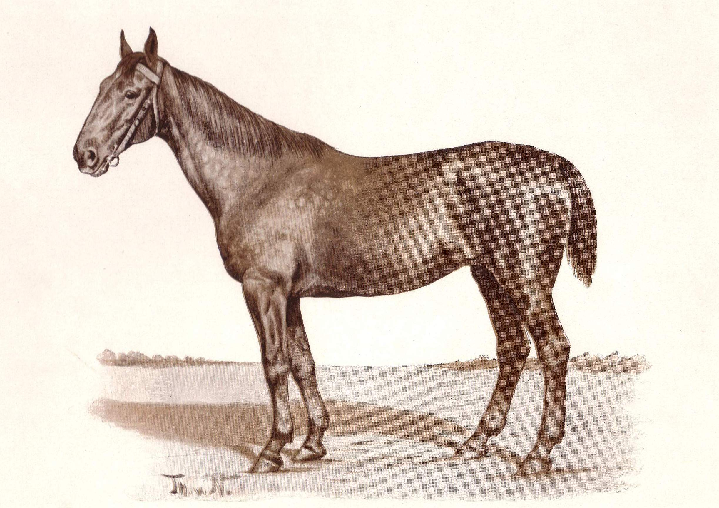 Hannoveraner. Rappstute, geb. 1883 in Dochtersen (Hannover)